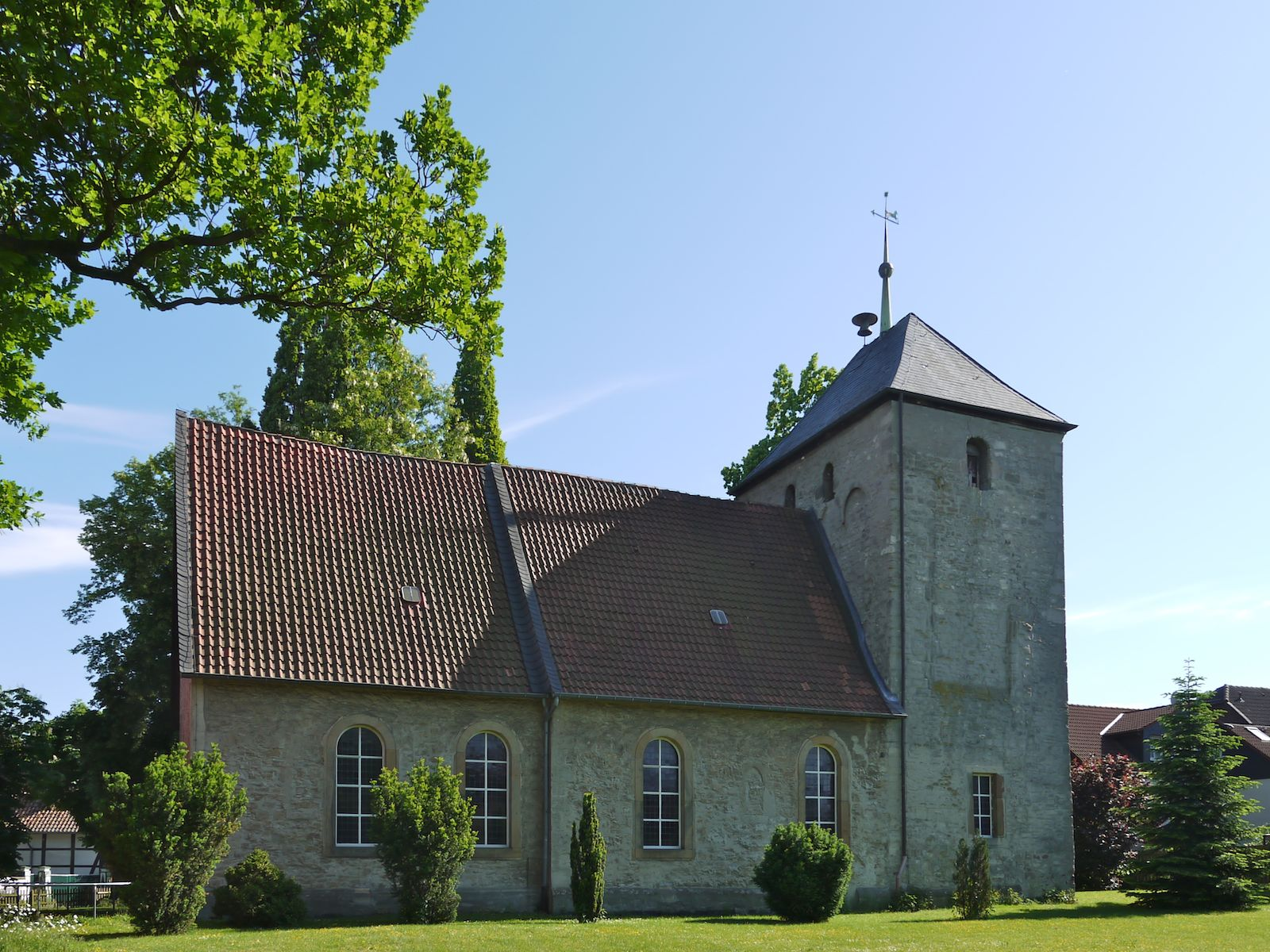 Evangelisch-lutherische St. Pauluskirche in Salzgitter-Sauingen